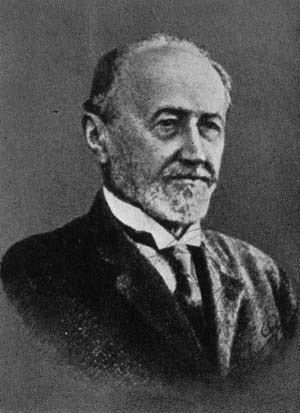 Вучетич, Жуан